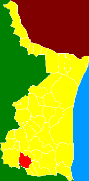 Municipio de Ocampo en el Estado de Tamaulipas